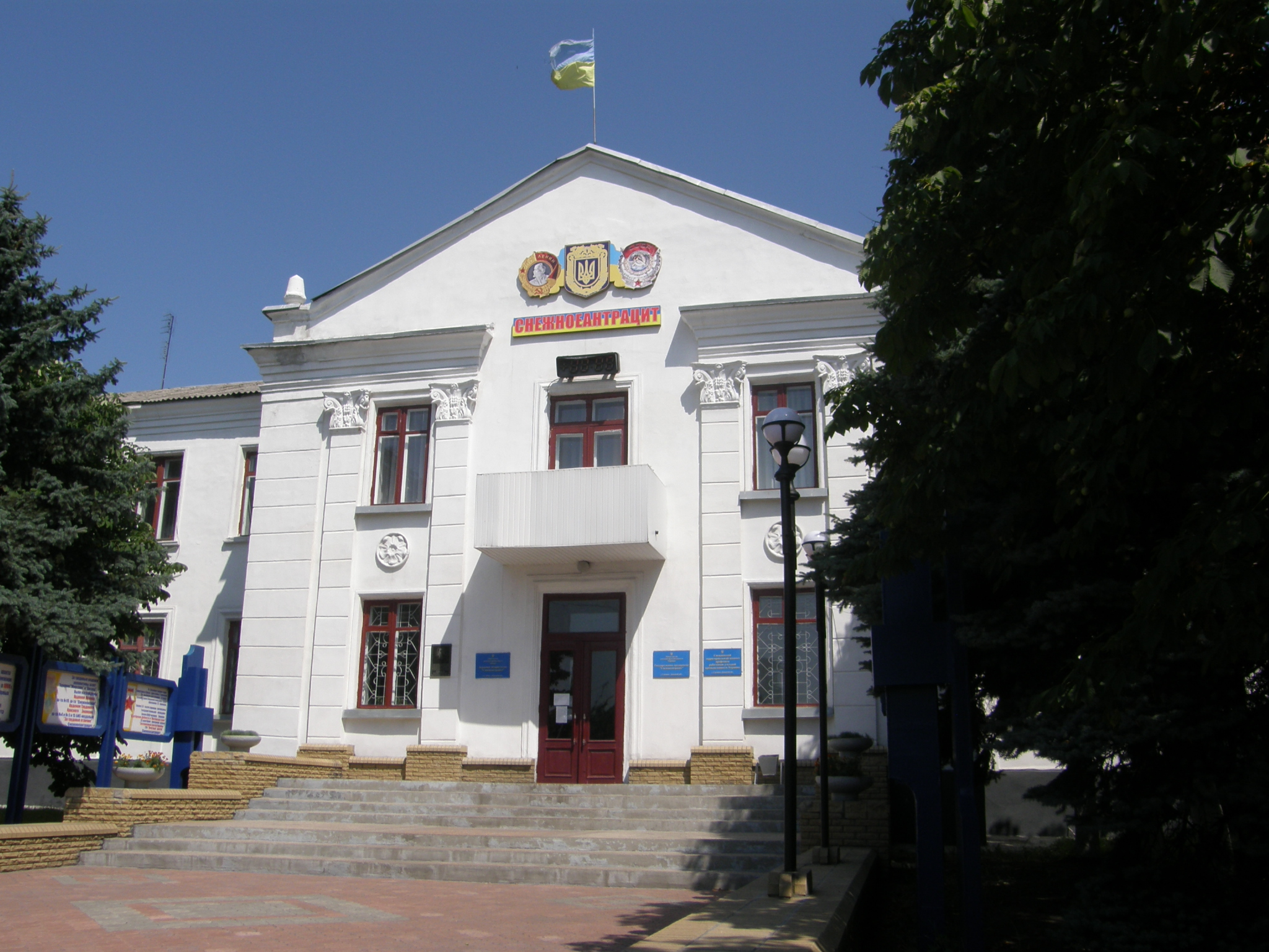 Снежное